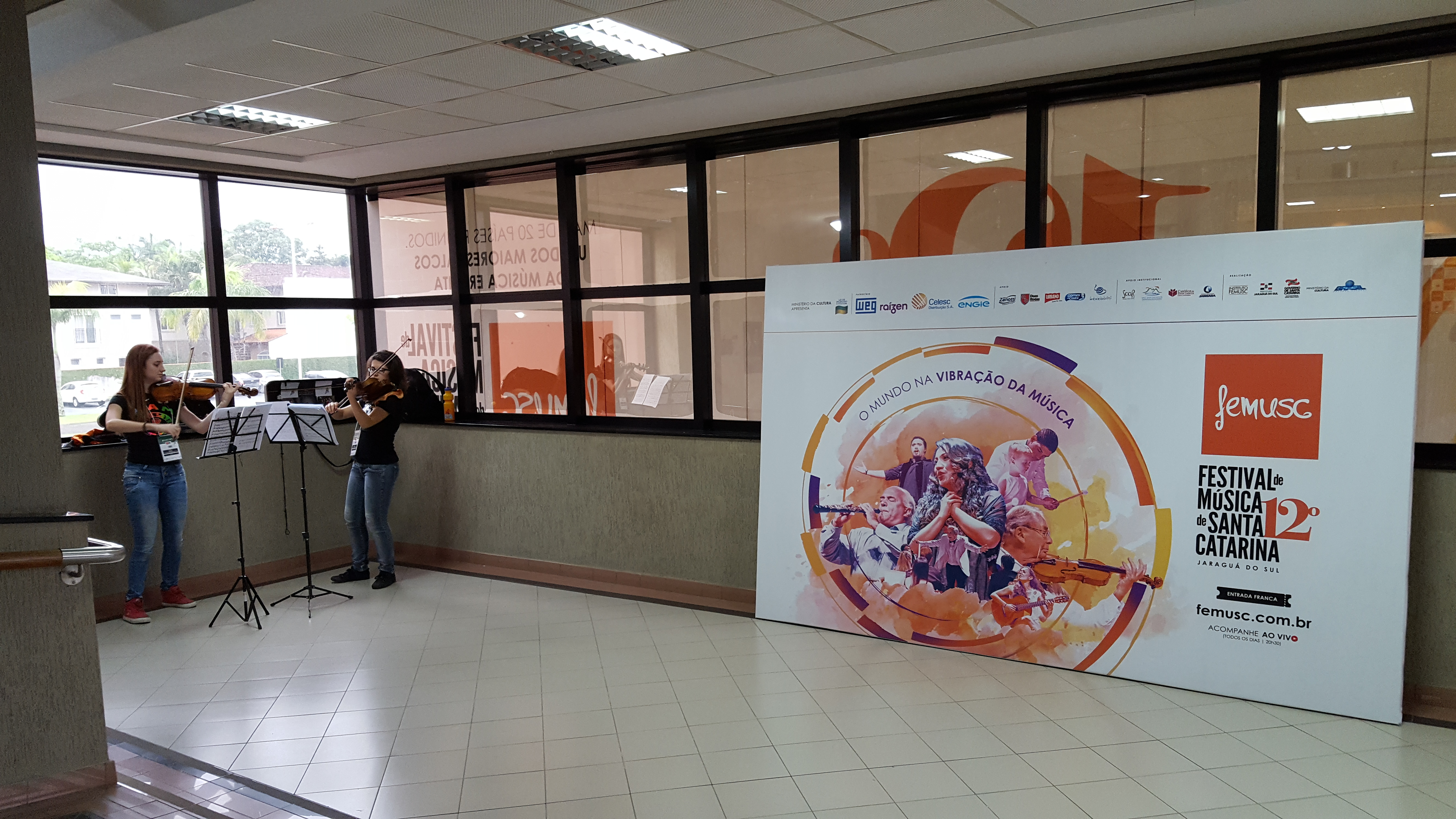 Femusc 2017, painel com o logotipo do evento e duas estudantes de violino.